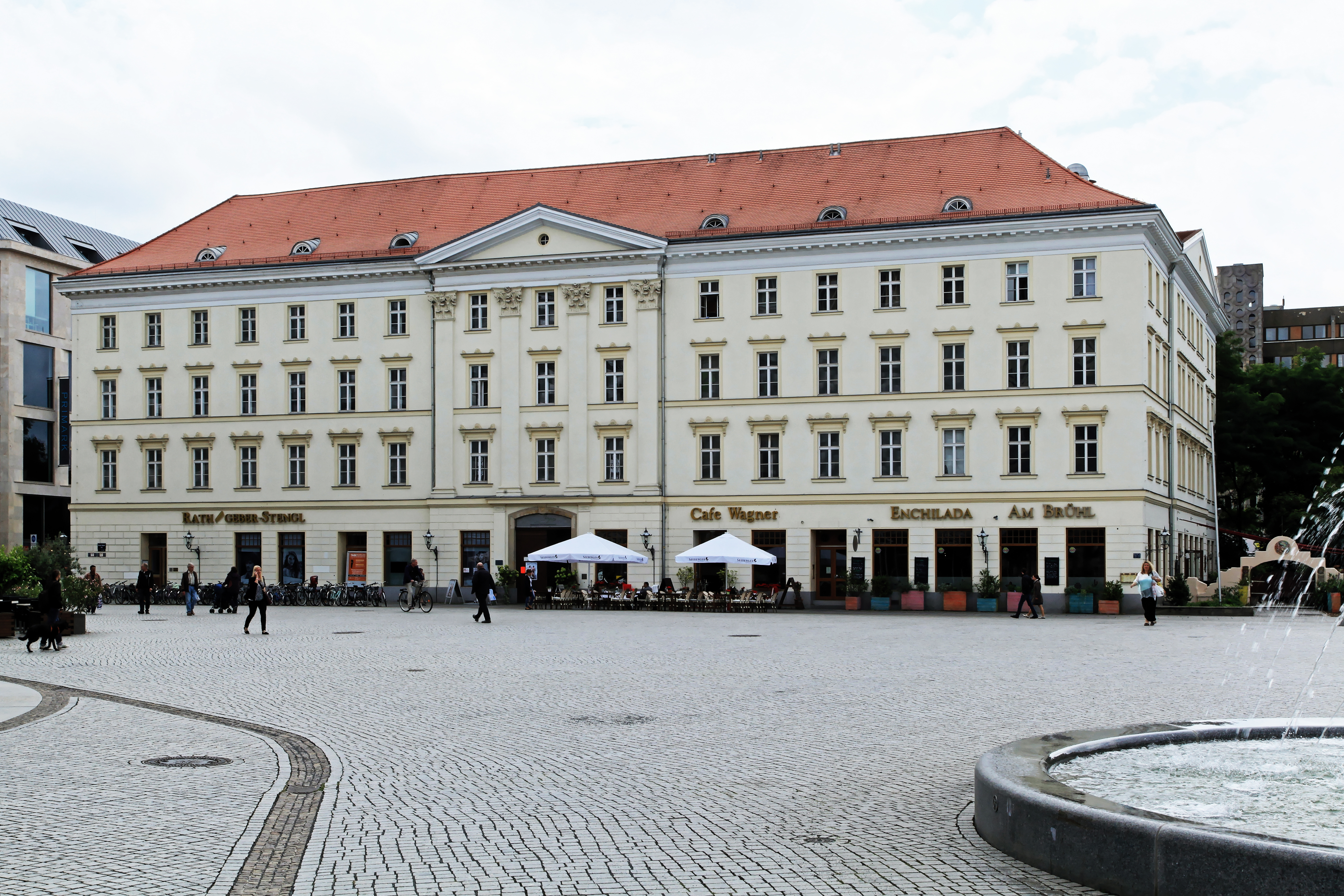 Großer Blumberg am Richard-Wagner-Platz in Leipzig